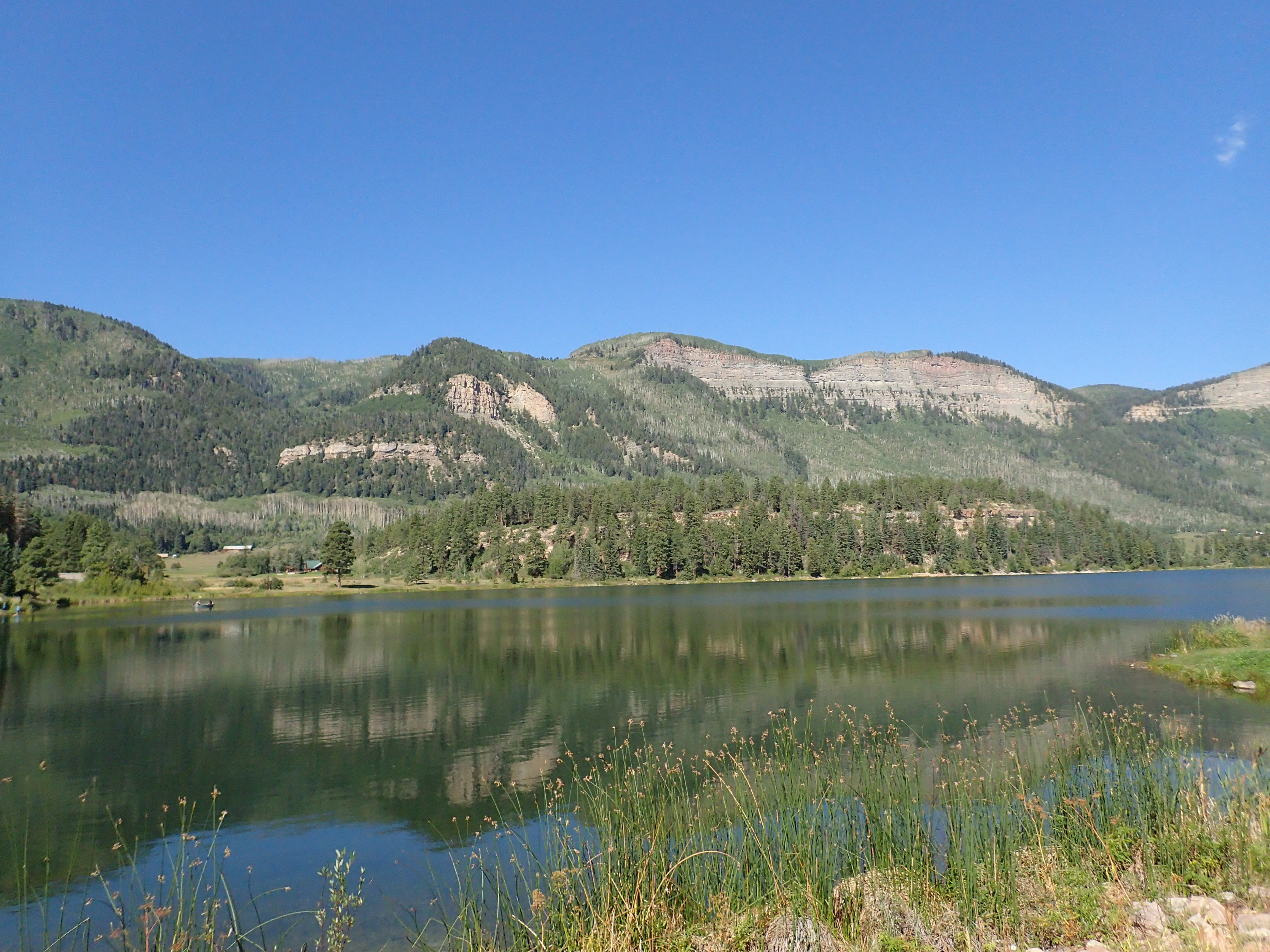 Haviland Lake